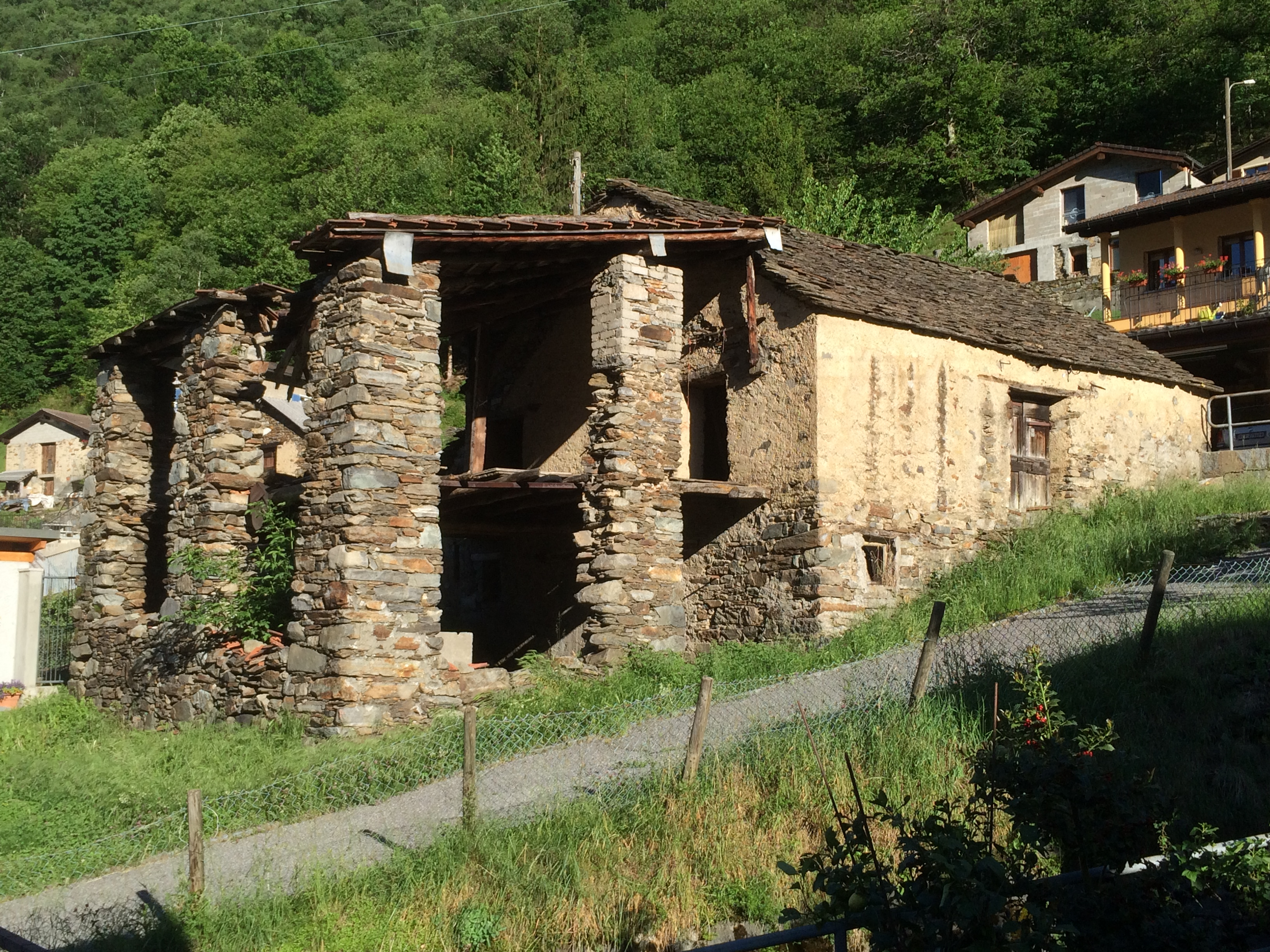 ISONE